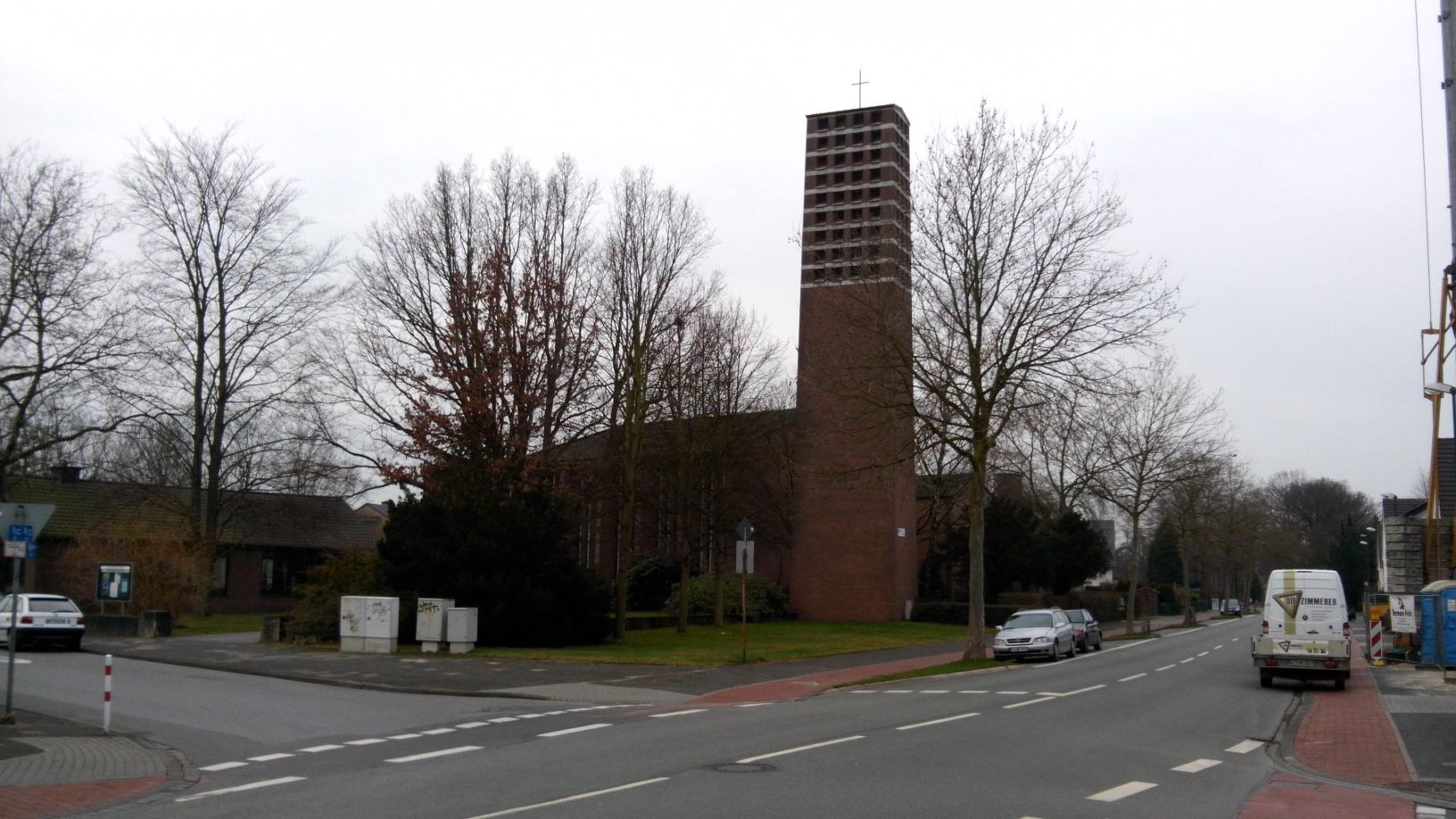 Kirche Zum Guten Hirten in Gütersloh.